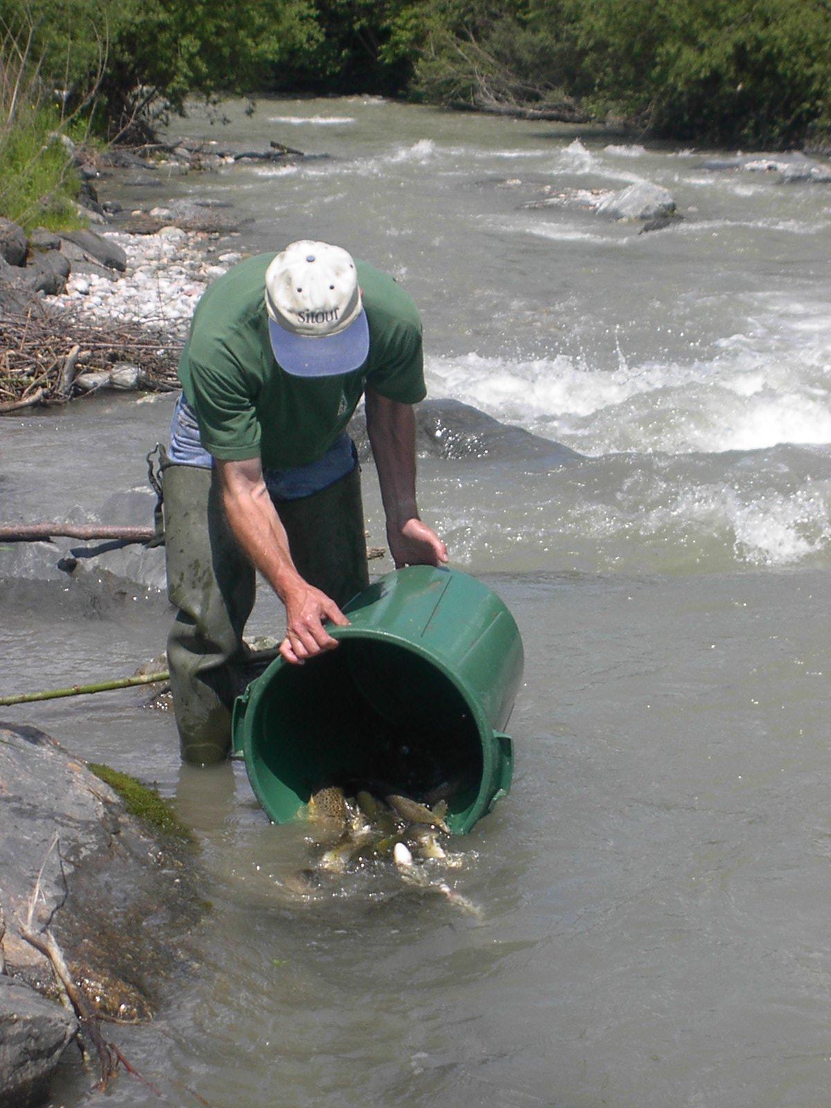 eigene Digitalfotografie